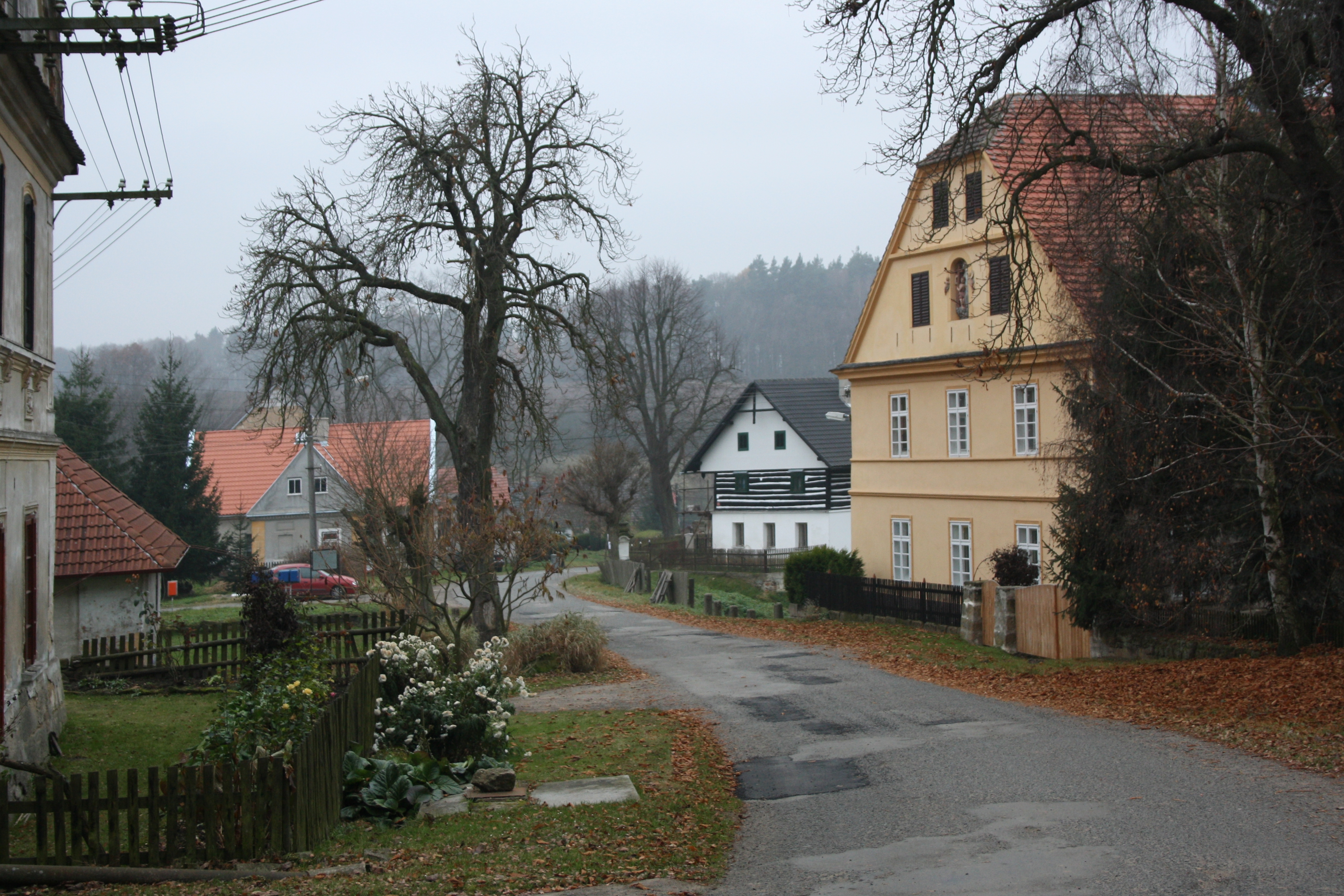 Drchlava